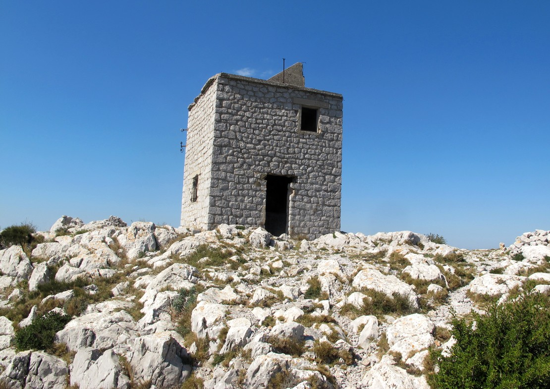 La tour des Opies, sur les rochers, au sommet du chaînon.